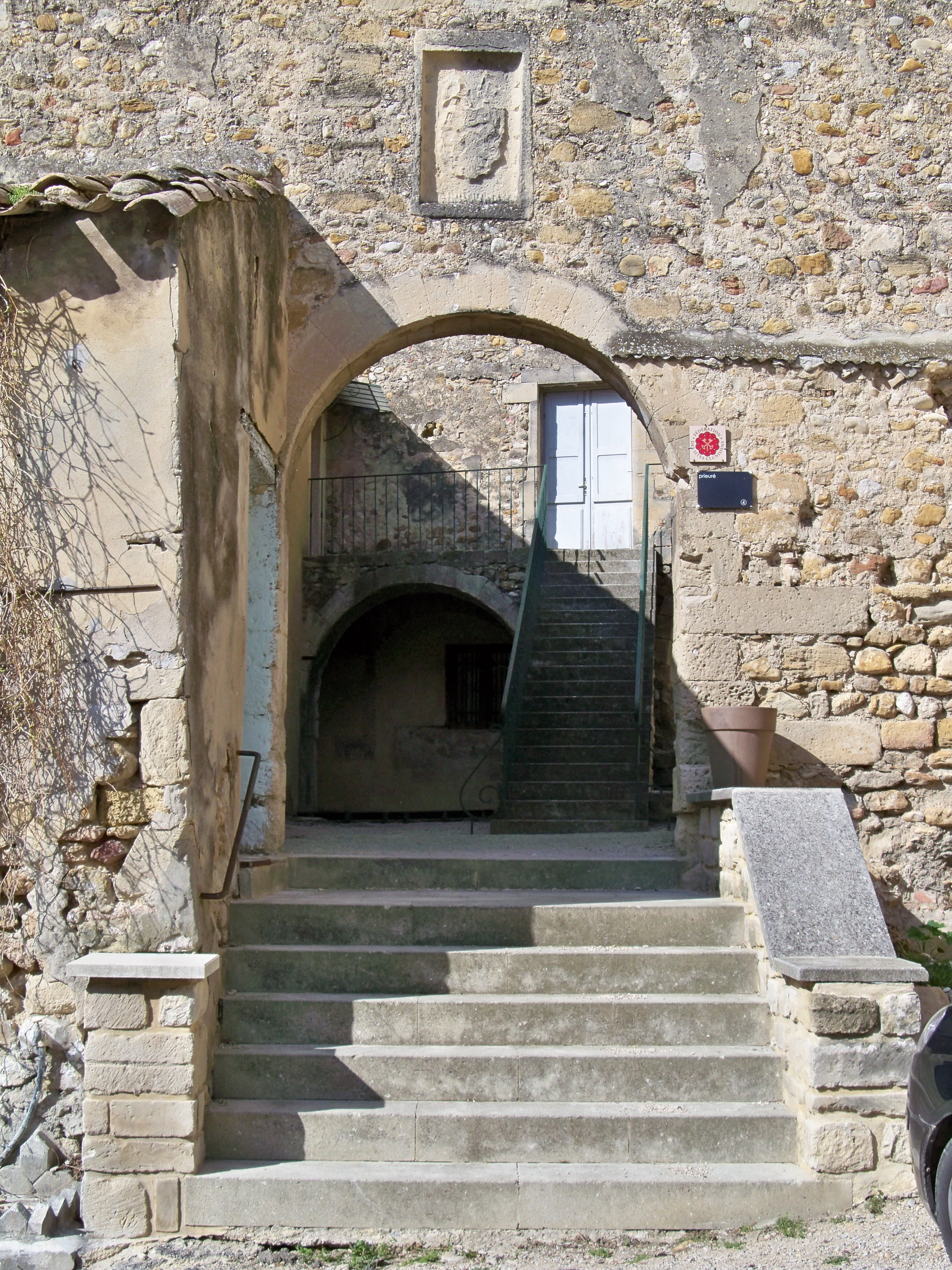 entrée du prieuré clunisien de Tulette (26)